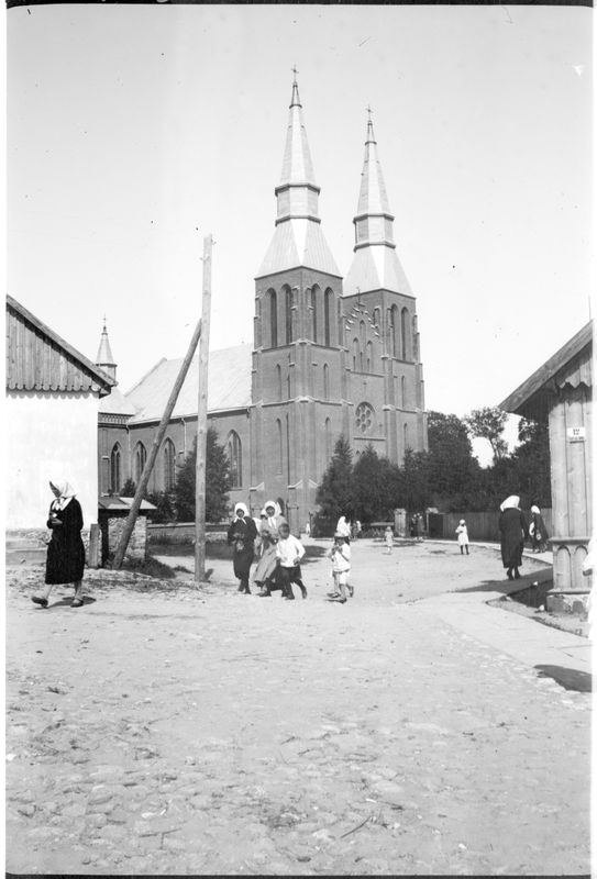 Kamajų Šv. Kazimiero bažnyčia XX a. 4 deš.